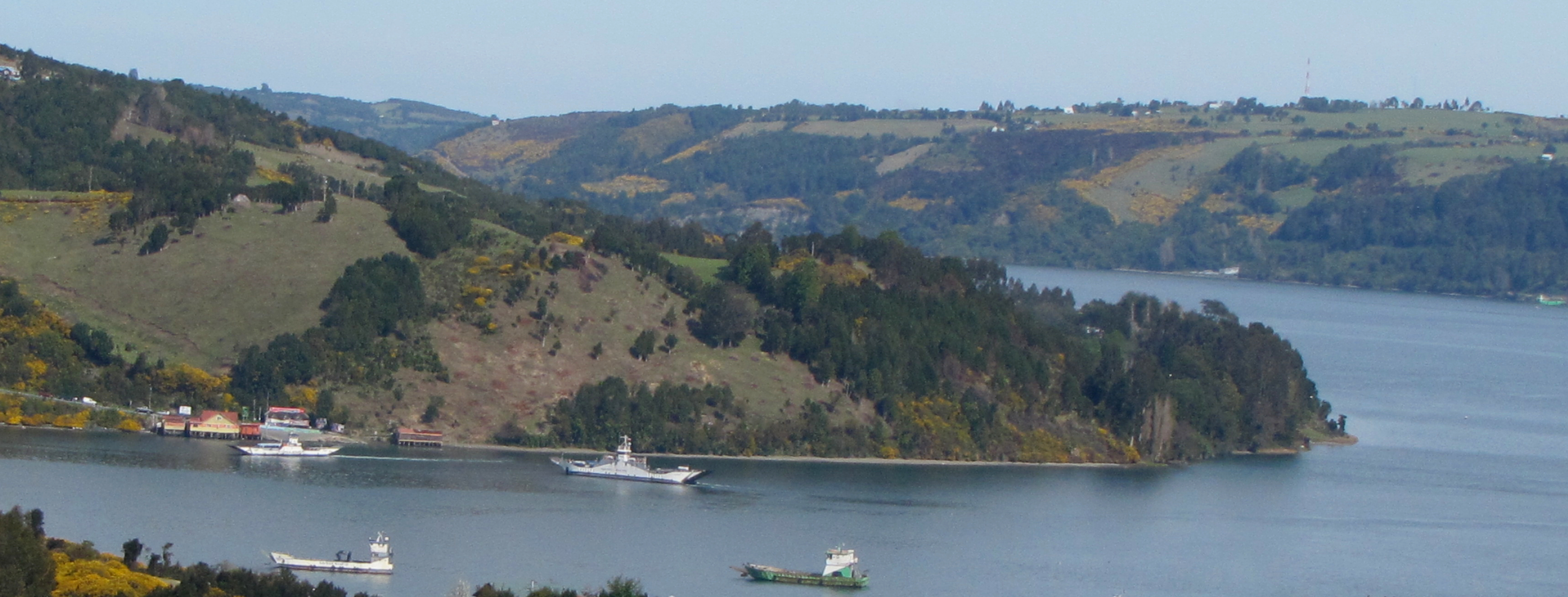 El Pasaje, en la isla Quinchao, y una curva del canal Dalcahue, Chile.